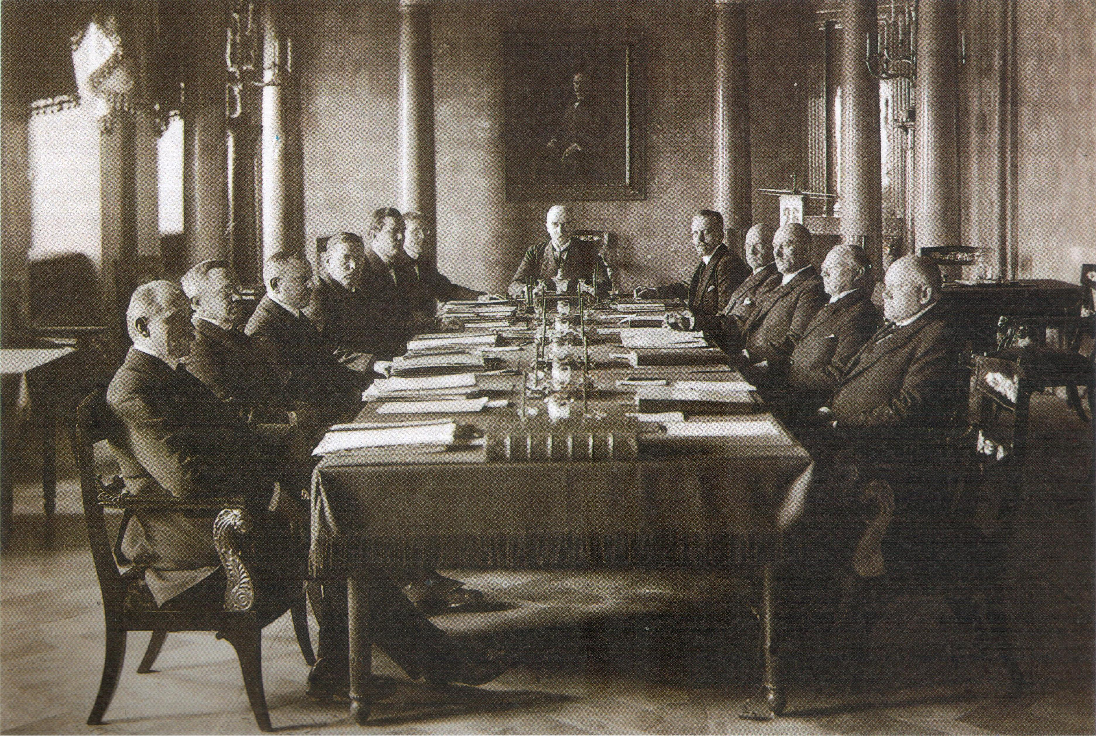 A. K. Cajanderin ensimmäinen virkamieshallitus. Pöydän päässä presidentti K. J. Ståhlberg, hänestä vasemmalle pääministeri Cajander.